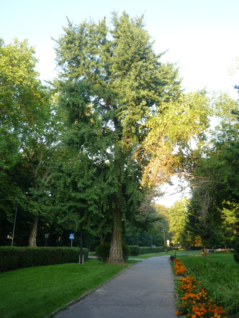 Pomnikowy miłorząb we Lwówku Slaskim